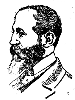 Retrato de Luis Silvela y de Le Vieilleuze, publicado en La Correspondencia de España.